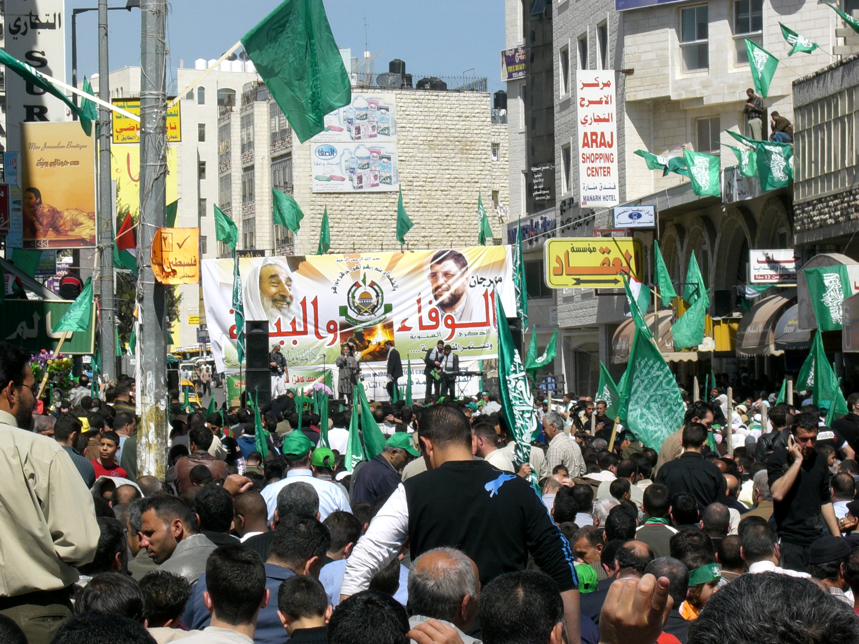 Verehrung Yasins und Rantisi bei einer Hamas Wahlkampfveranstaltung in Ramallah